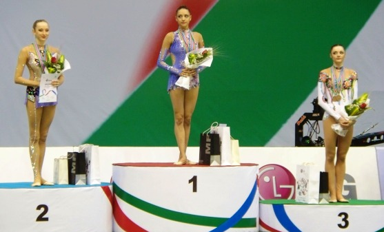 церемония награждения. ЧЕ по худож.гимнастике Баку, 2009